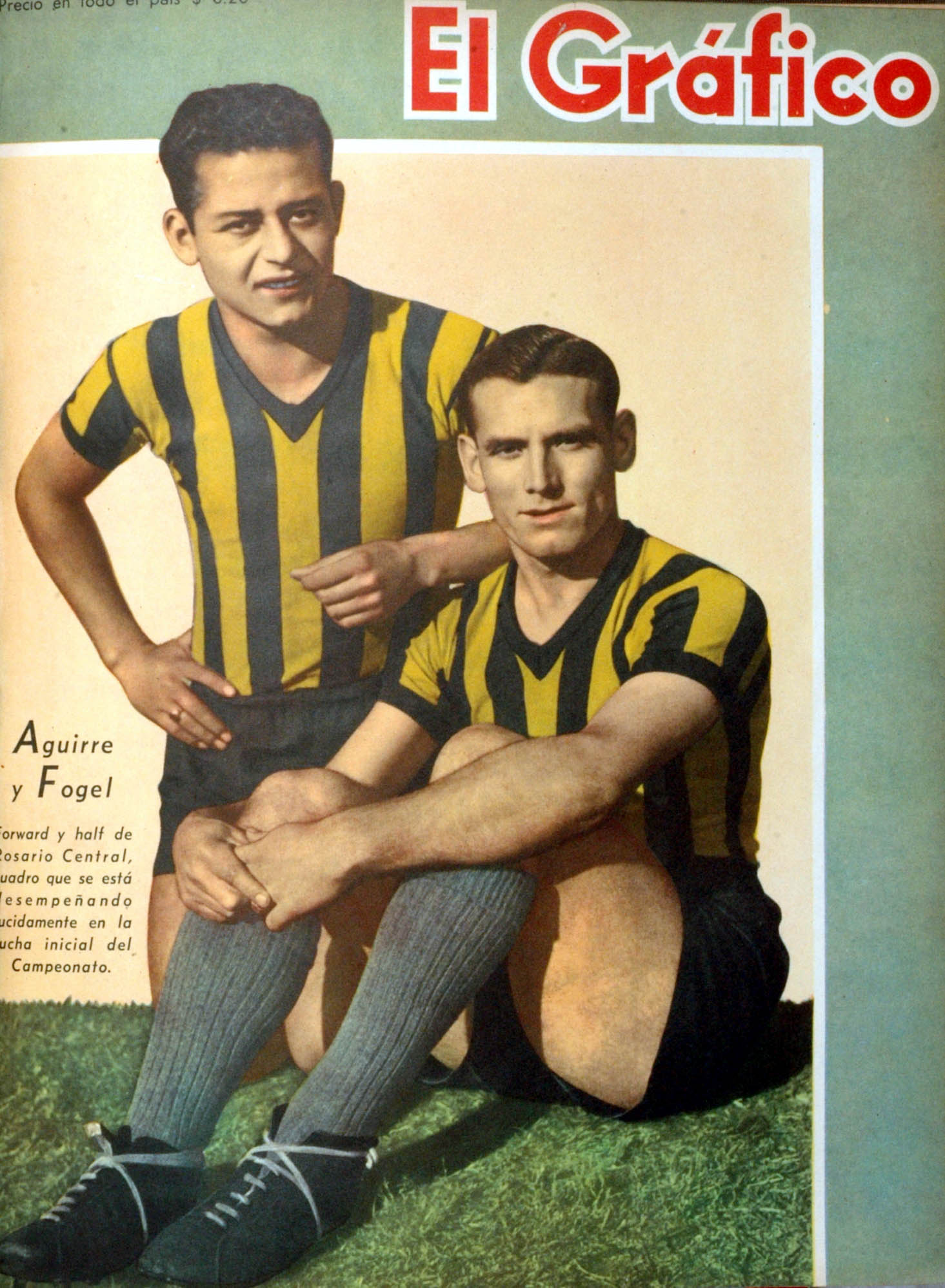 El Grafico del 11 de Junio de 1943. Edicion 1248